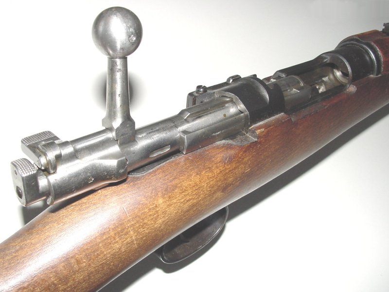 Mauser System 98 - Carl Gustav M96